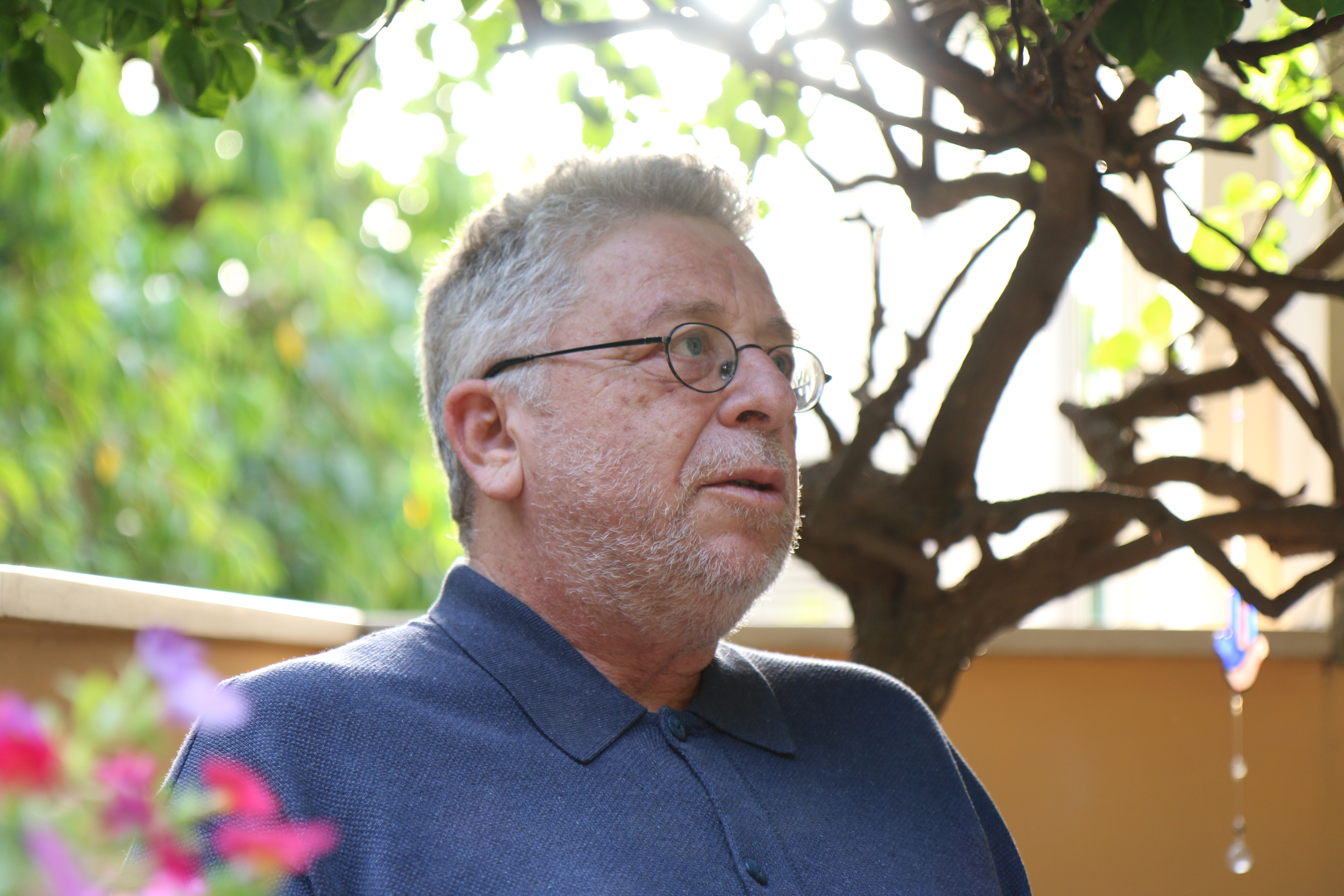 יואל קמינסקי הוא תסריטאי ישראלי, עורך תסריטים, ומרצה בתחום הקולנוע.